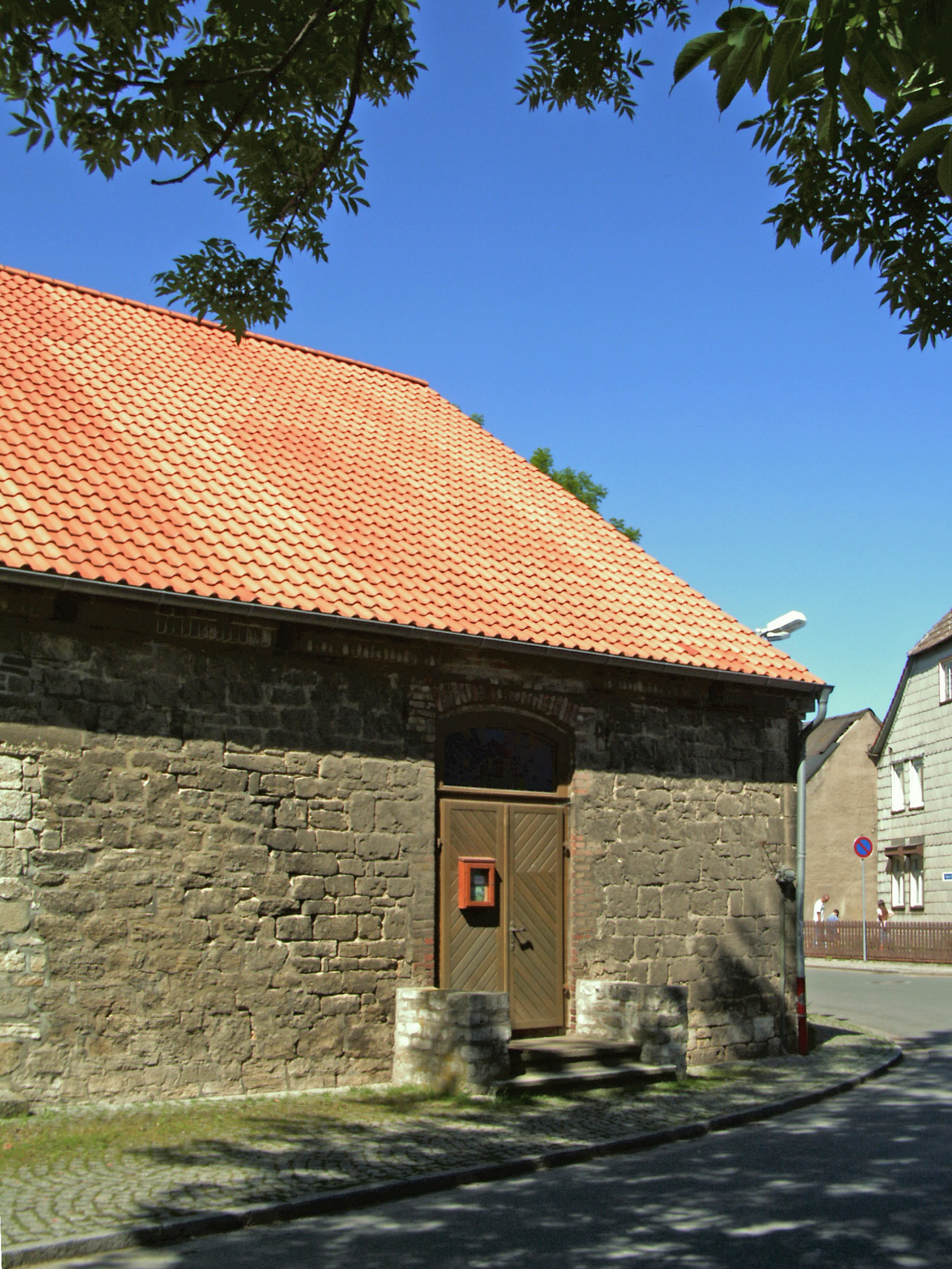 Katholische Kapelle in Zilly, Ortsteil von Osterwieck